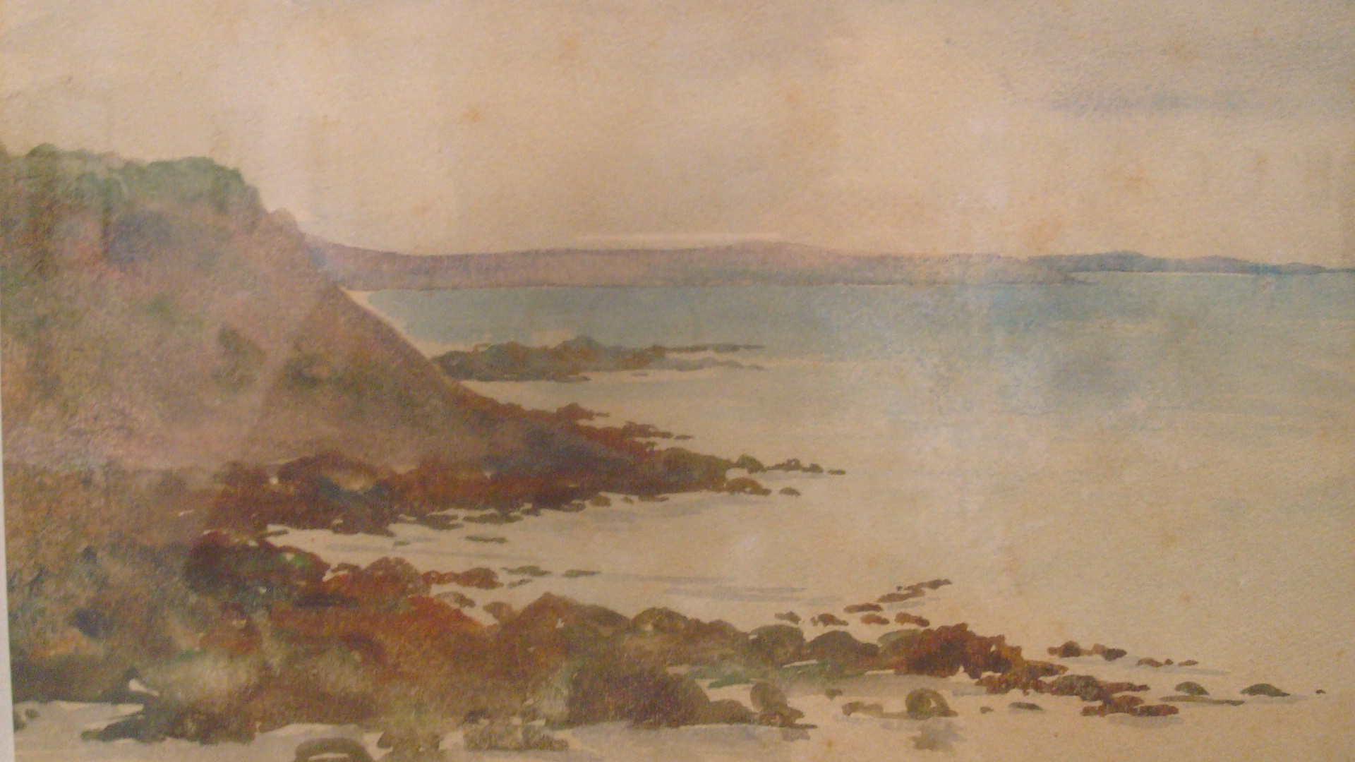 Paisaje (acuarela, 1912), por el costarricense Carlos Herrero (1893-1918). Museo de Arte Costarricense.